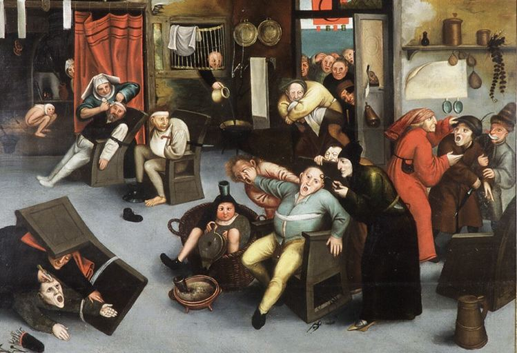 L’Excision de la Pierre de folie Painting after a print by Pieter Bruegel